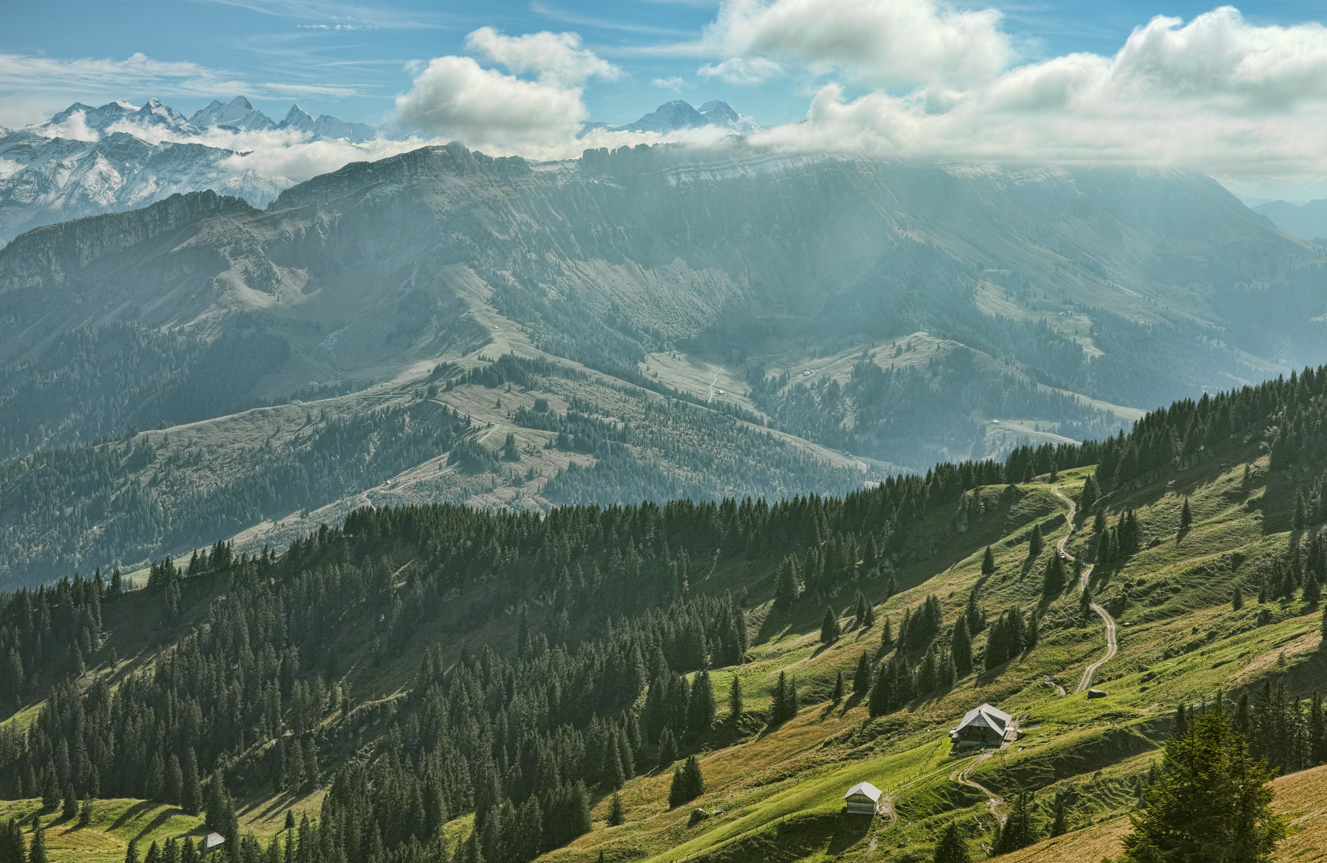 UNESCO Biosphäre Entlebuch